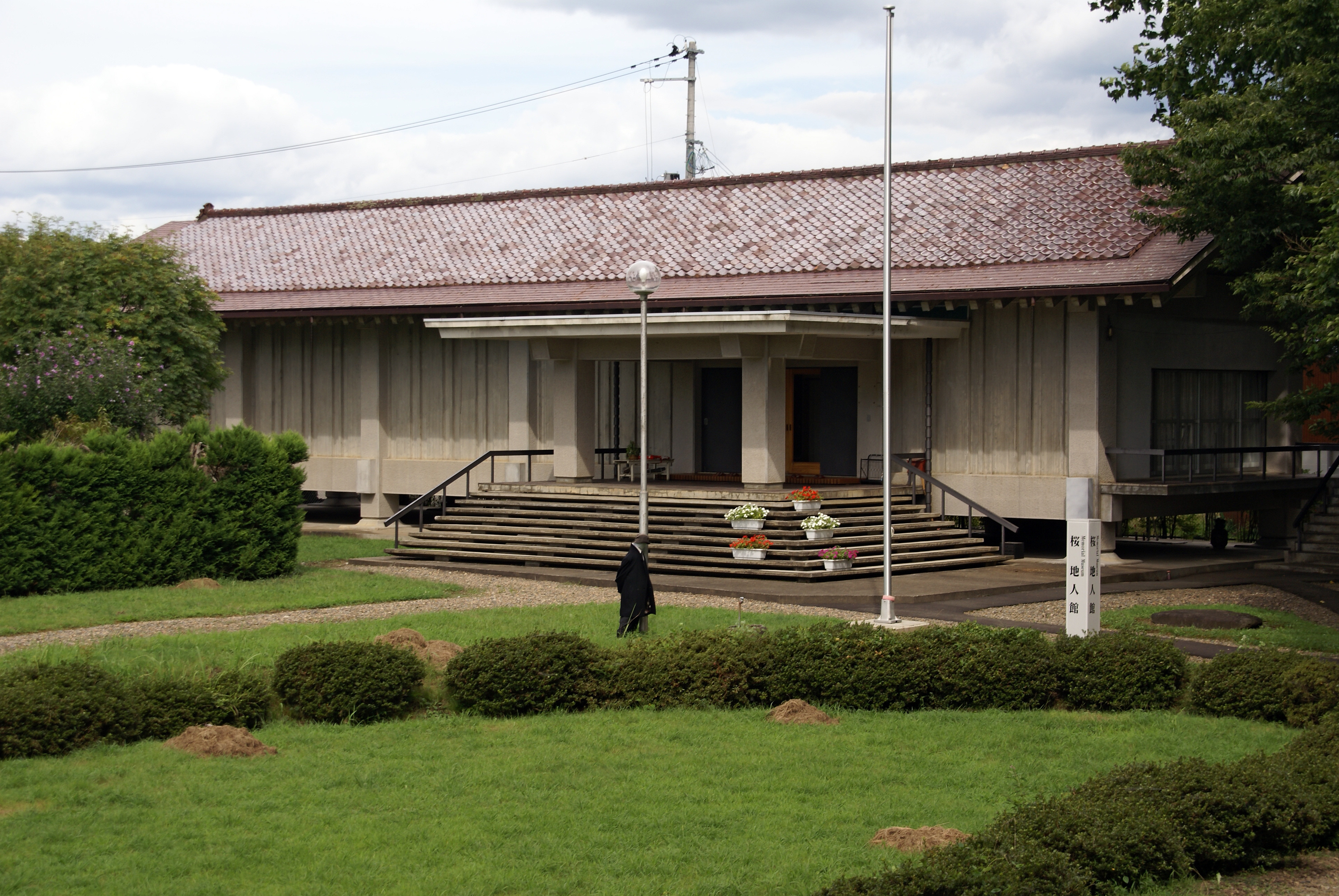 Sakura-Chijinkan in Hanamaki, Iwate prefecture, Japan